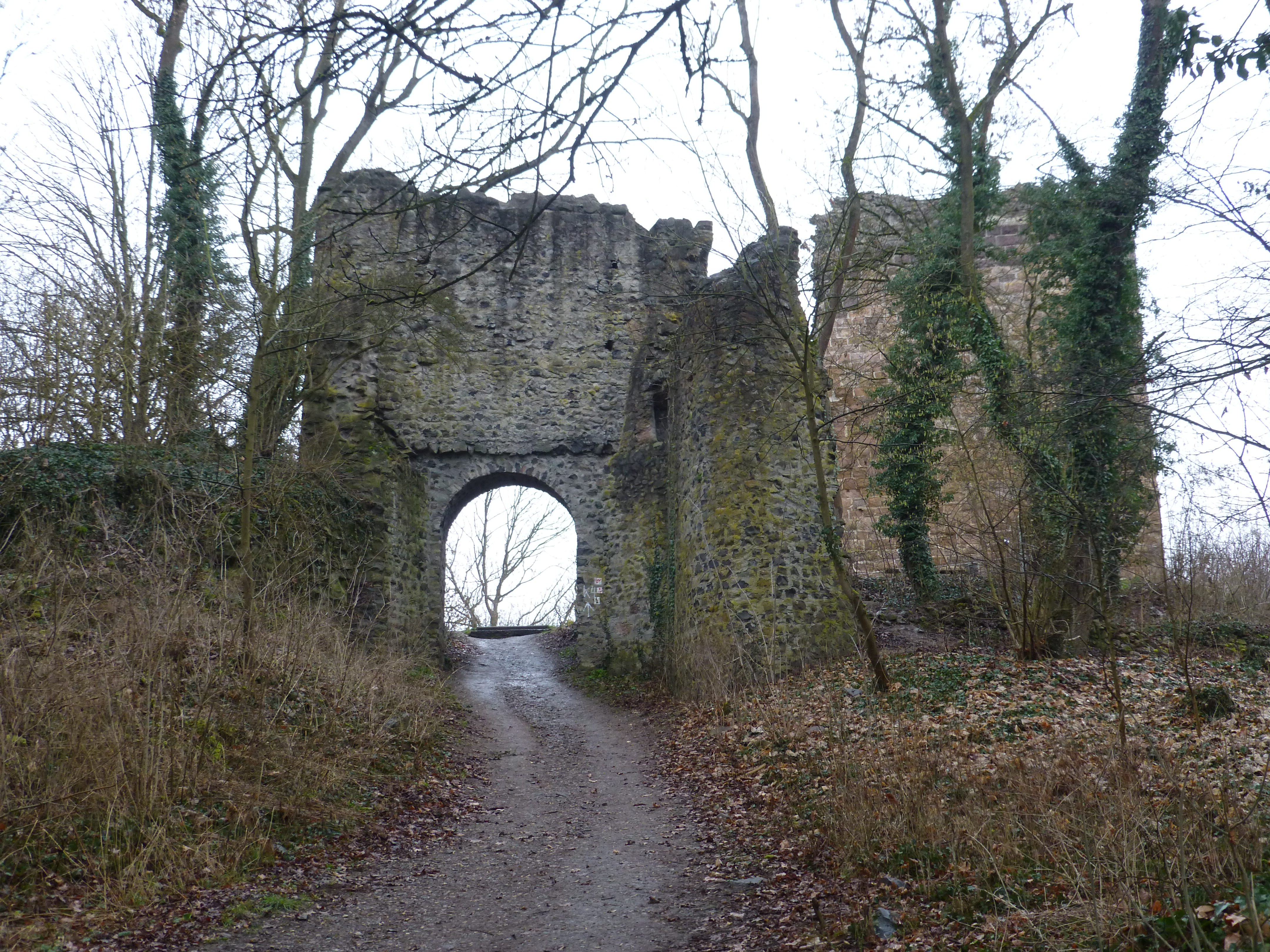 Burg Kalsmunt; Zugang auf der Ostseite der Burg